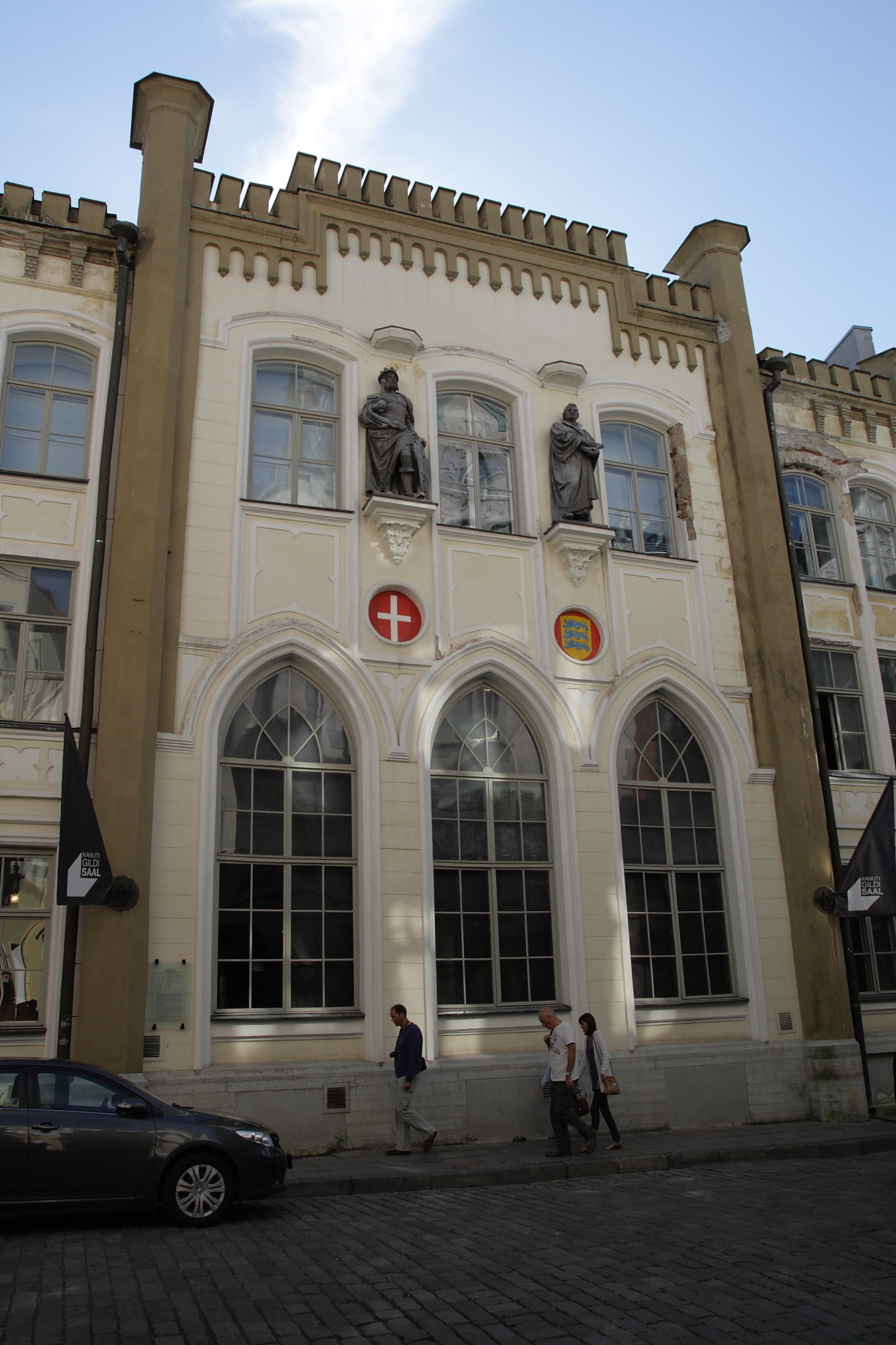 Tallinna Kanuti gildi hoone, 1863